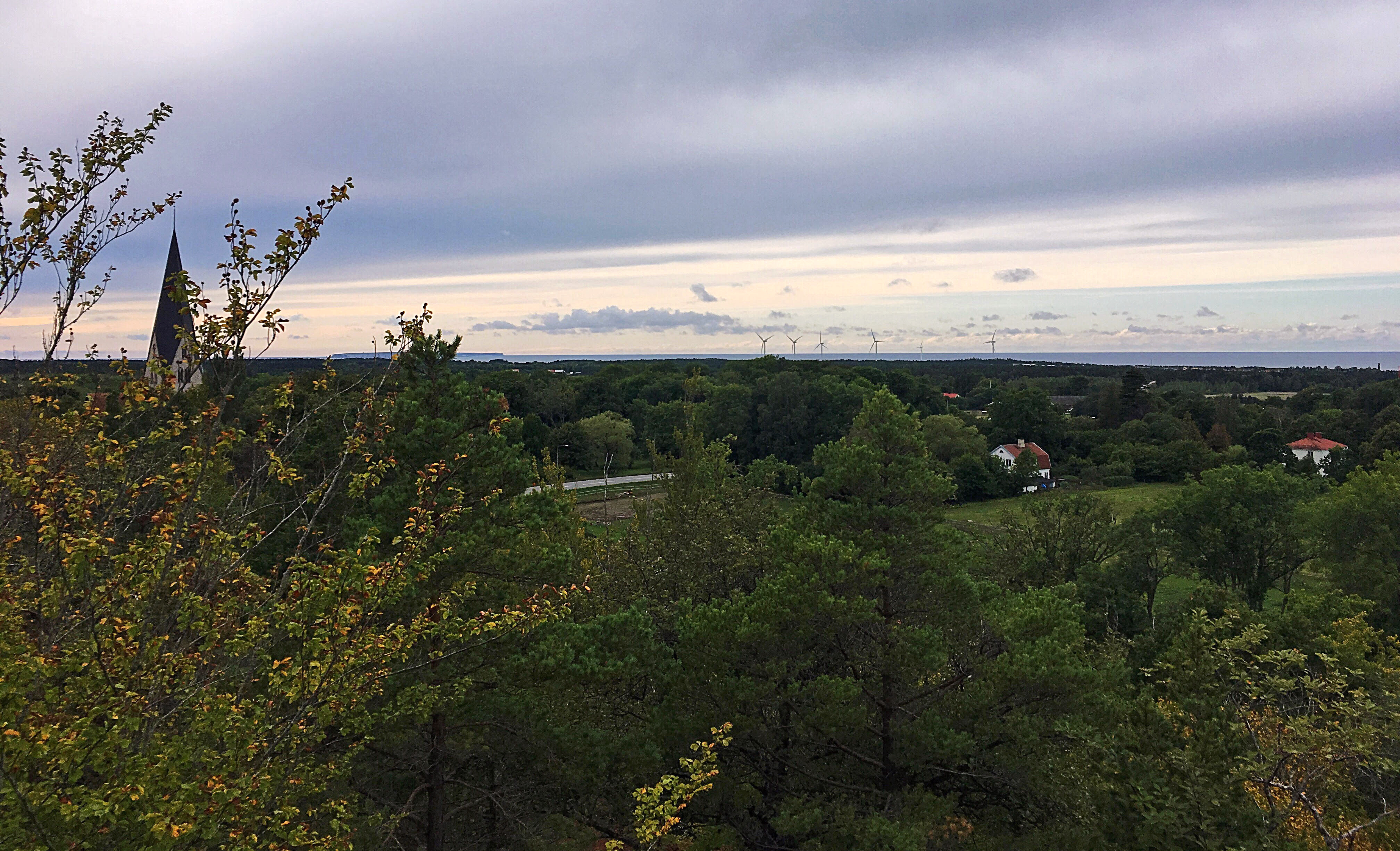 Utsikt från Klinteberget, något redigerad och beskuren.